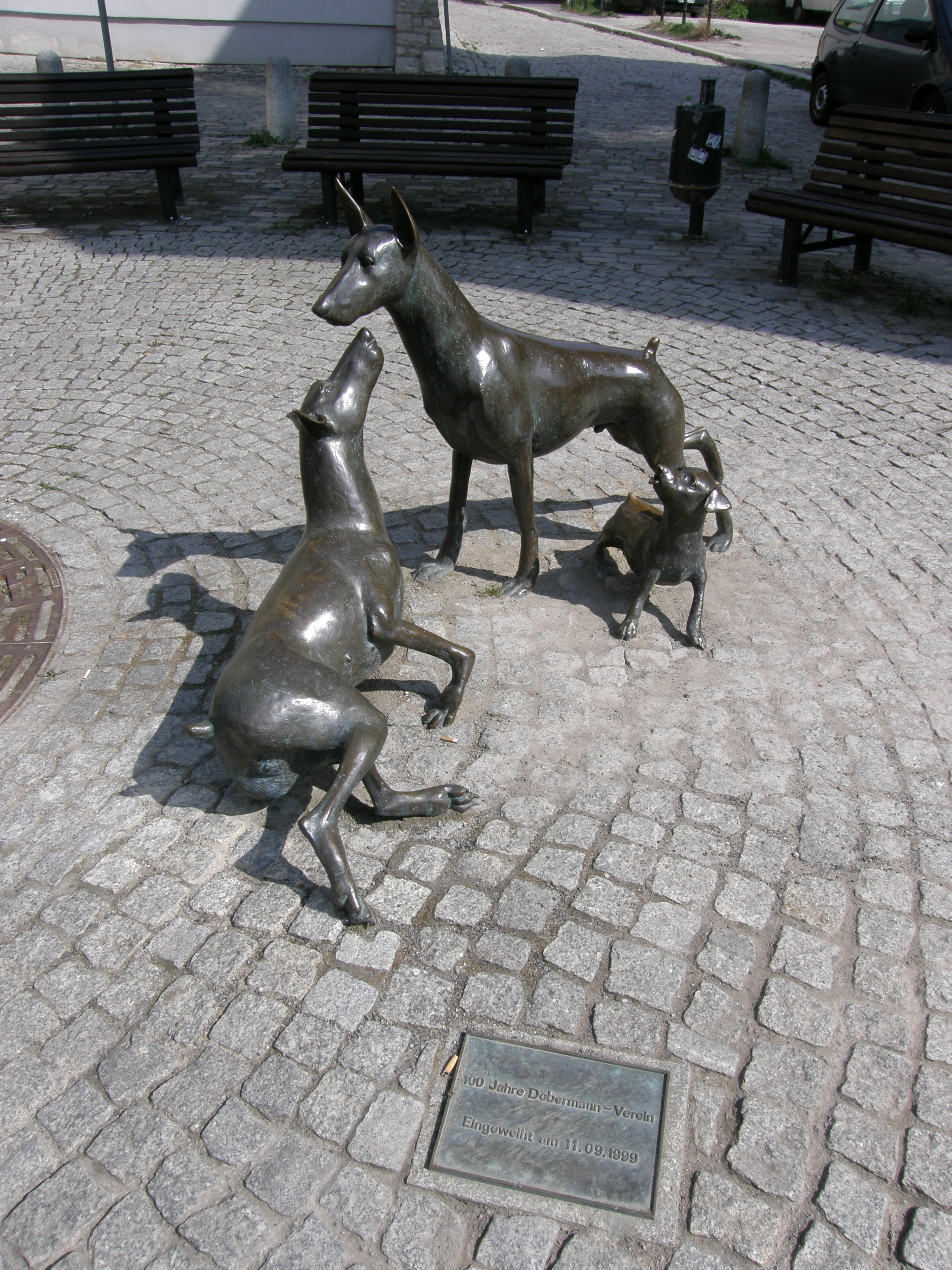 Stadt Apolda - Dobermann Denkmal